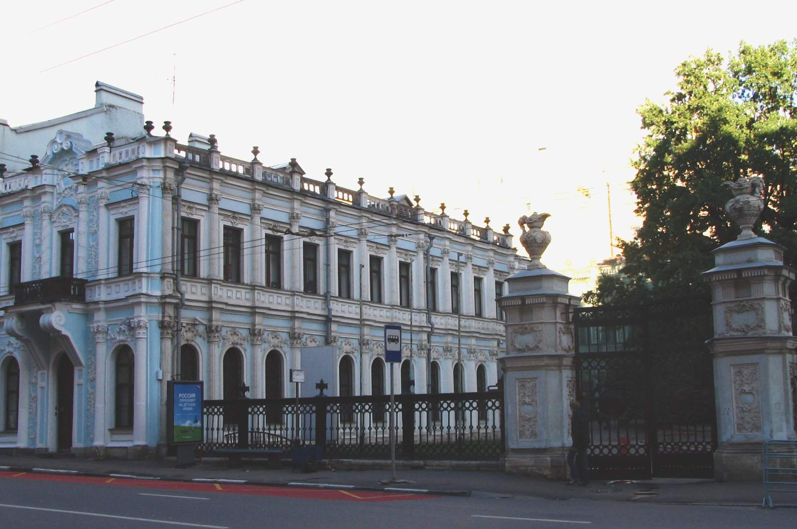 Bolshaya Lubyanka Street, 14